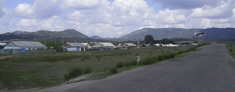 Bajanaul Dorf